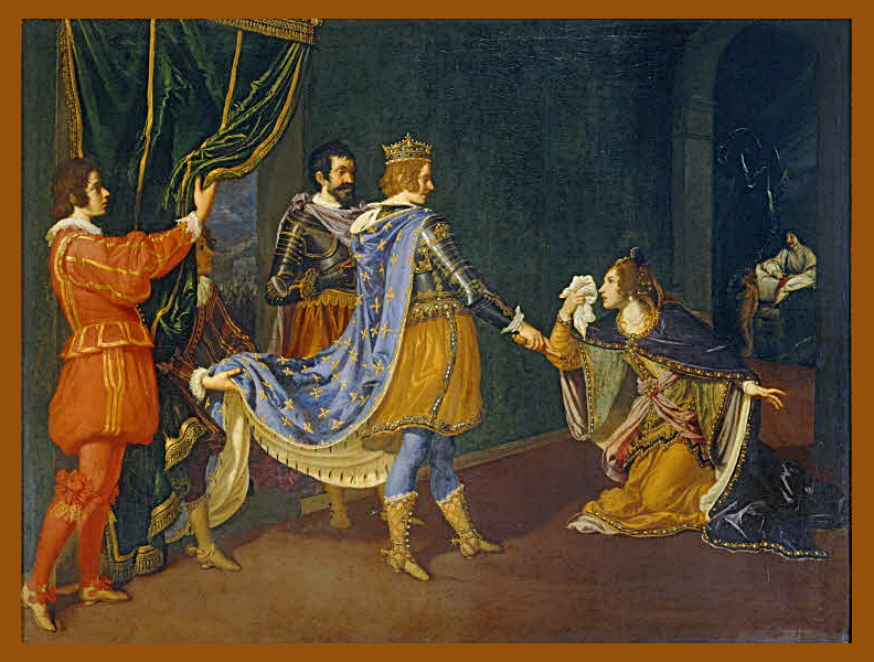 Giovanni BILIVERT Florence, 1576 - Florence, 1644 Giovanni Bilivert (Attribué à), Florence, 1576 - 1644.- Isabelle d'Aragon implorant Charles VIII en faveur de son père, Alphonse, roi de Naples, et de son mari, Giovanni Galeazzo Sforza, duc de Milan, lors de la conquête de Naples (Italie) par les Français en 1494. Le tableau, acquis en 1817 par le Département des Peintures du Musée du Louvre (INV. 51) a été donné à Cristofano Allori (1577 - 1621) et à Anastasio Fontebuoni (vers 1580 - 1626).